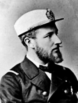 Luís Augusto de Saxe-Coburgo-Gota (1845-1907), marido de D. Leopoldina de Bragança e Bourbon, filha de D. Pedro II do Brasil.